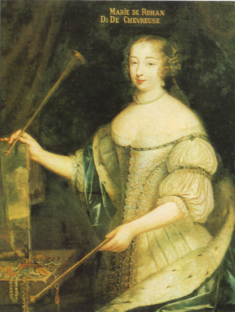 Portrait d'une femme inconnue vers 1660